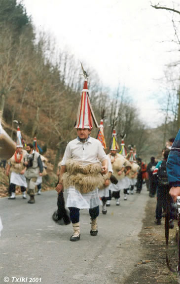 Ioaldunak (porteurs de sonnailles) à Ituren Pyrénées).